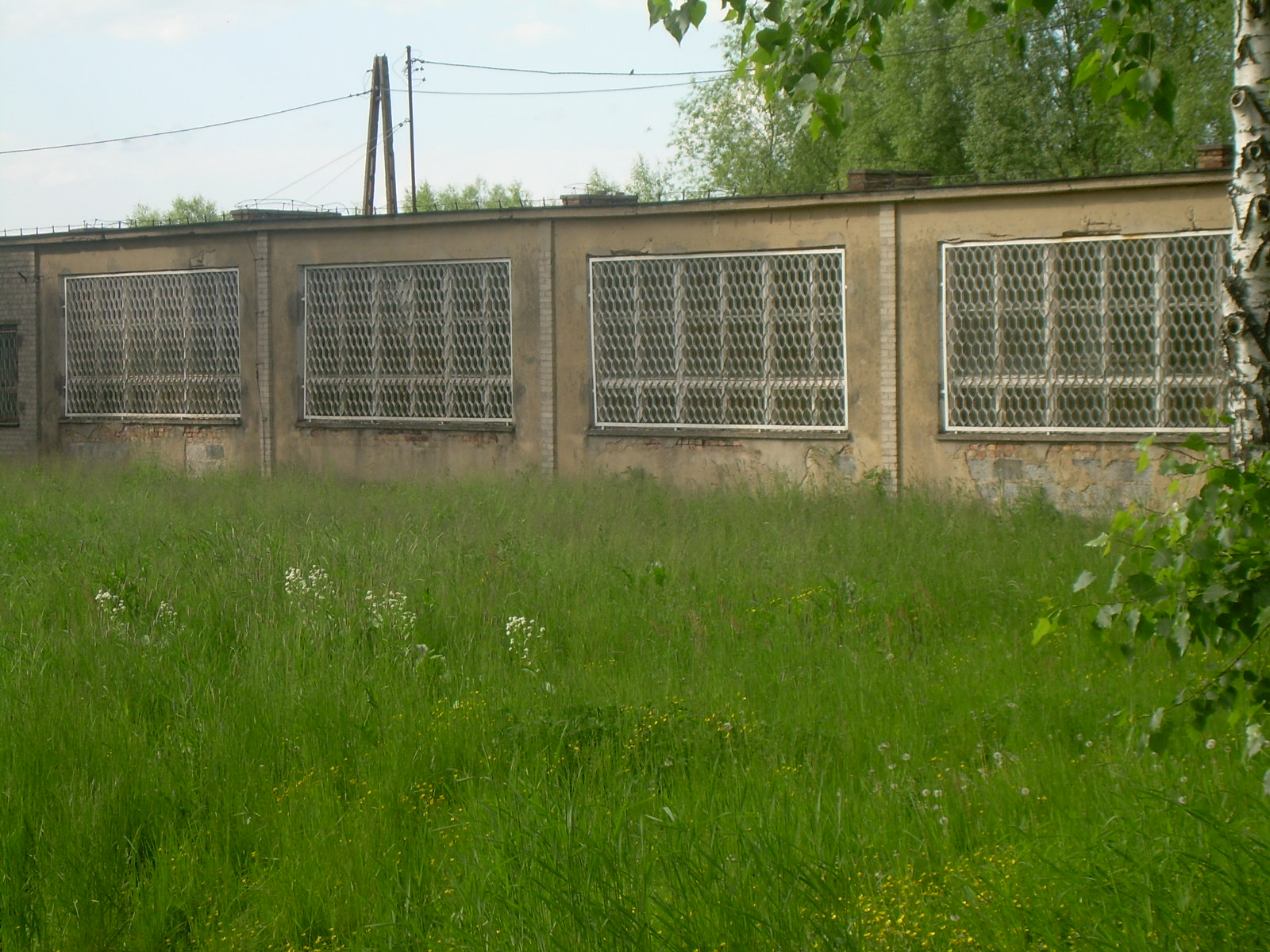 Krzyszczynka - Budynek dawnej szkoły podstawowej